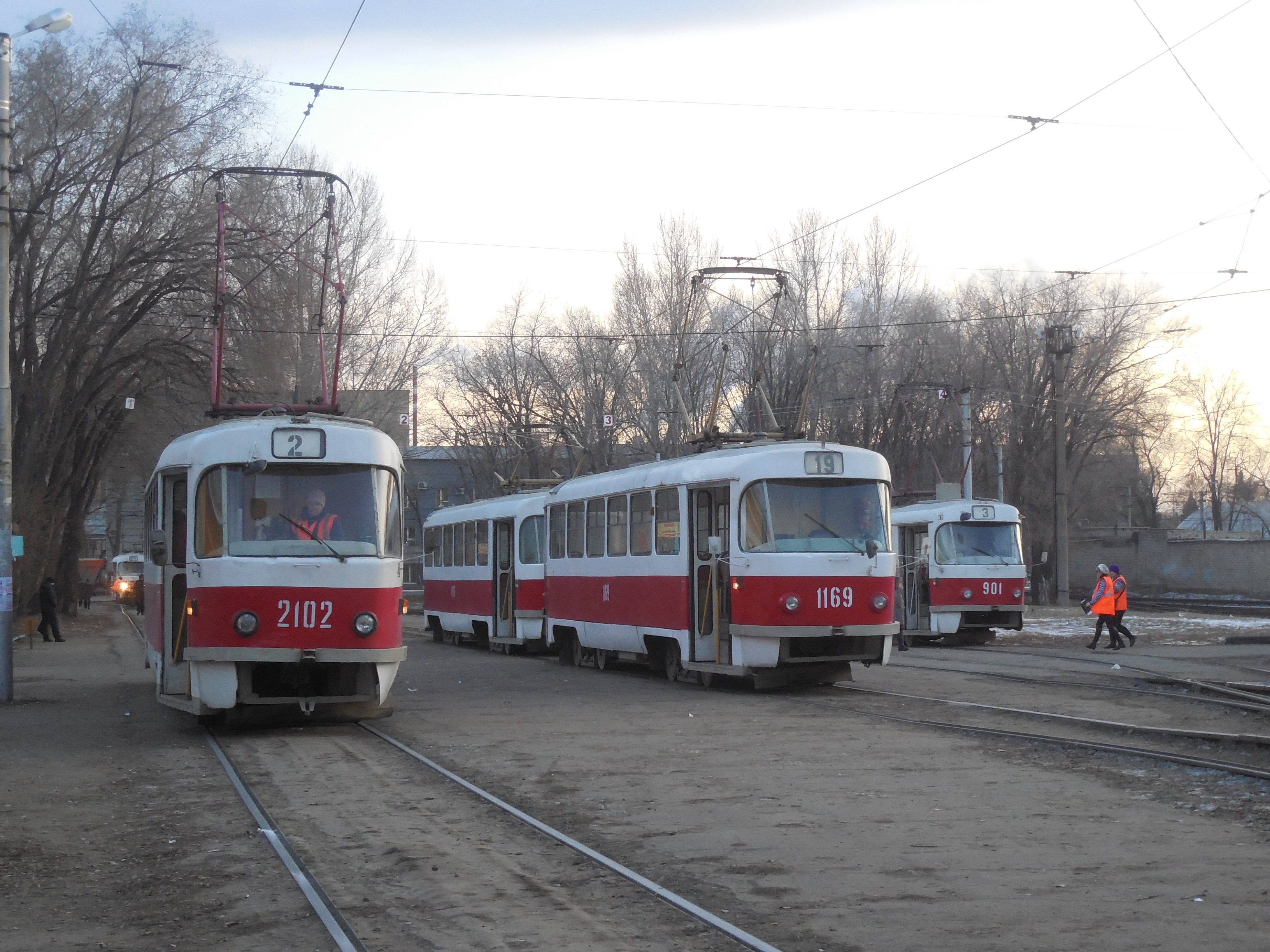 Samara tram 2014